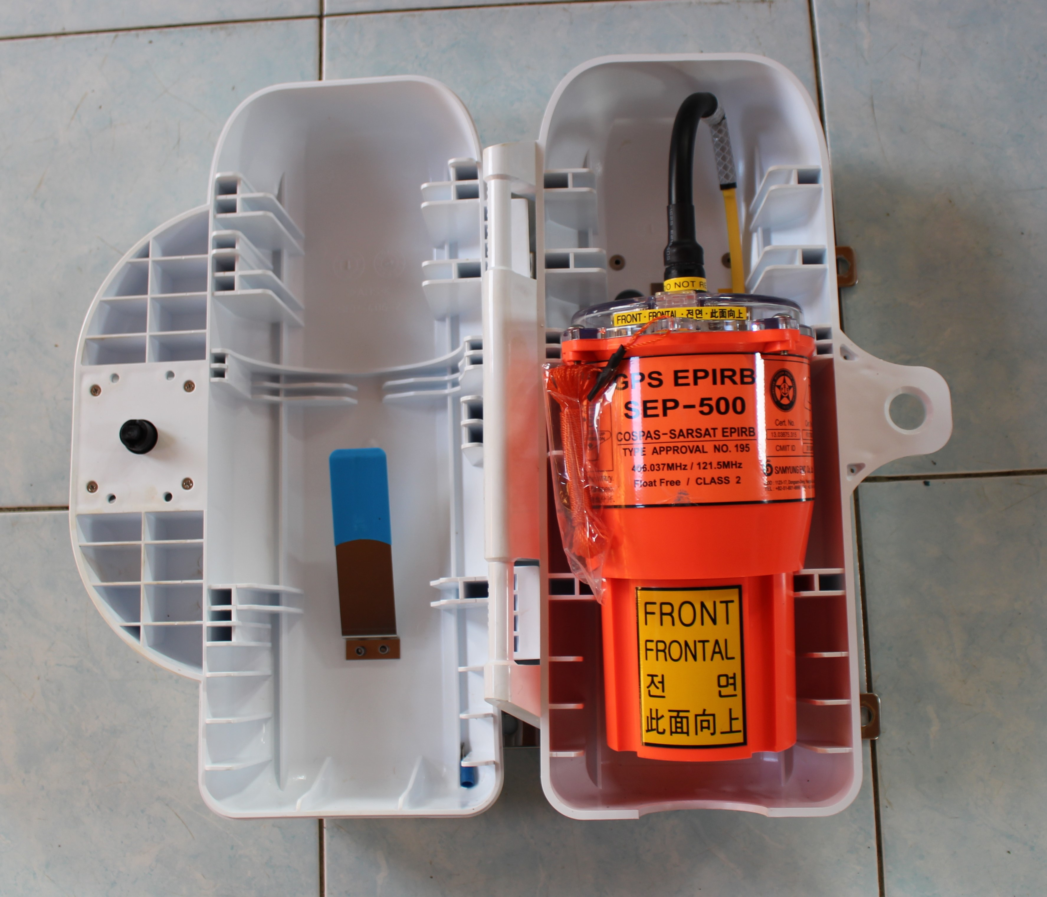 Emergency Position-Indicating Radio Beacon (EPIRB) adalah beacon 406 Mhz untuk pelayaran merupakan elemen dari Global Maritime Distress Safety System (GMDSS) yang memancarkan isyarat marabahaya jika kapal dalam keadaan darurat.